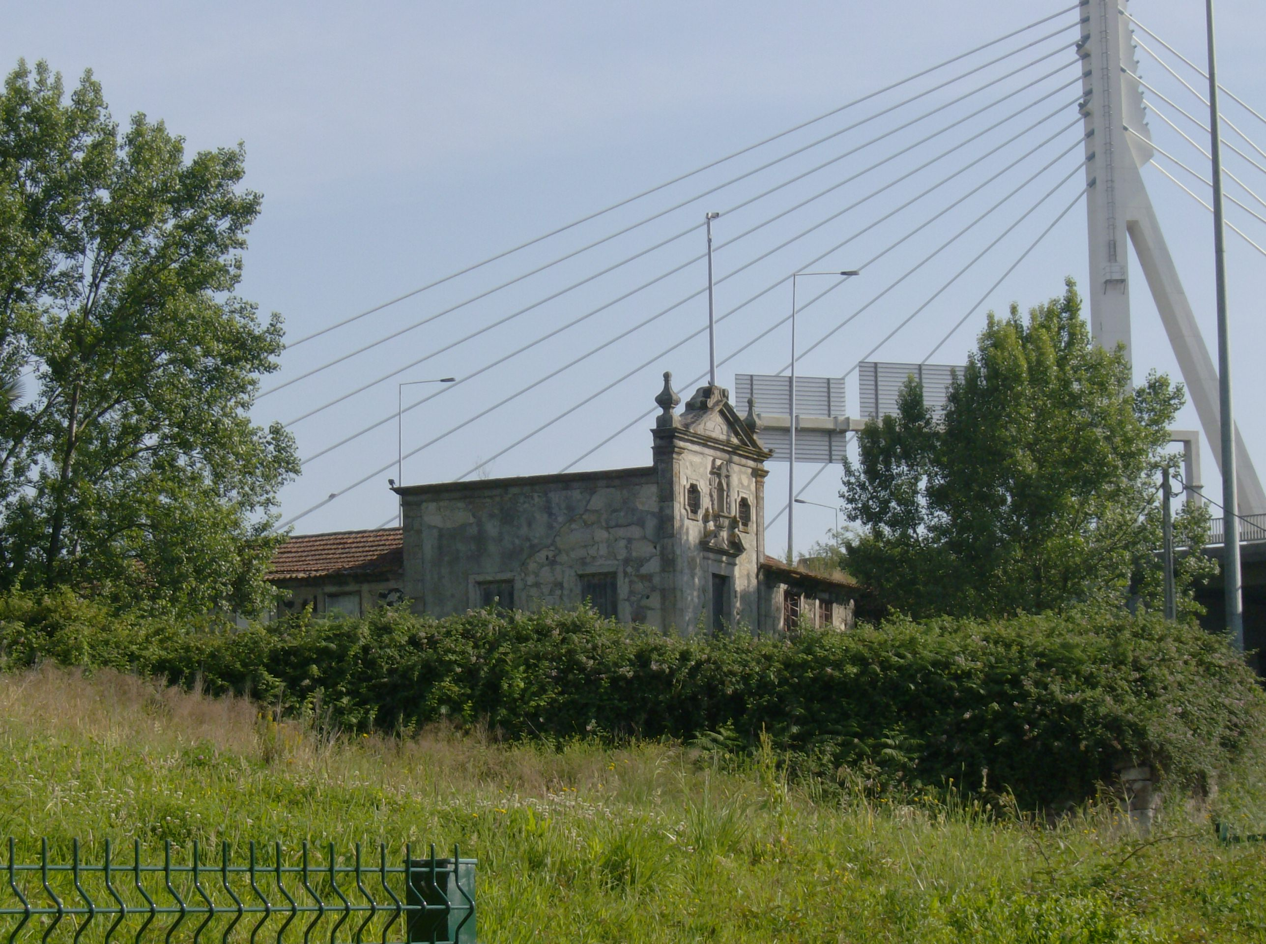 Quinta de Vila Meã Porto, Campanhã